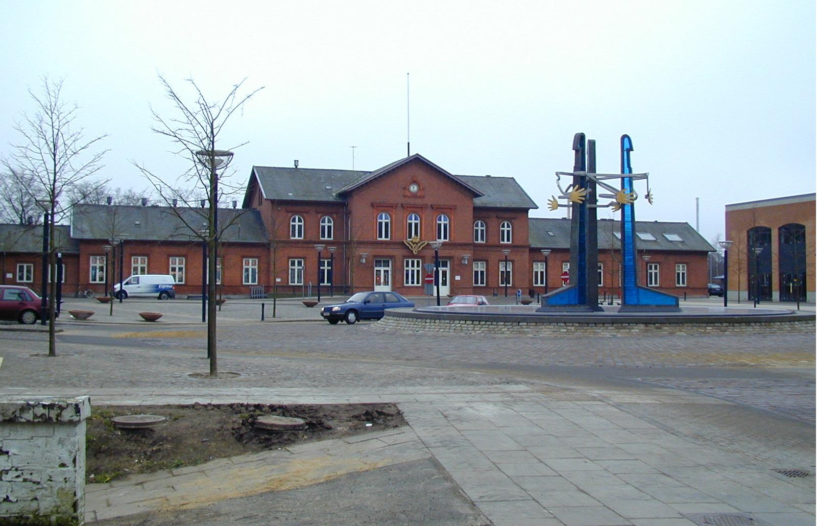 Category:Train_stations_in_Denmark